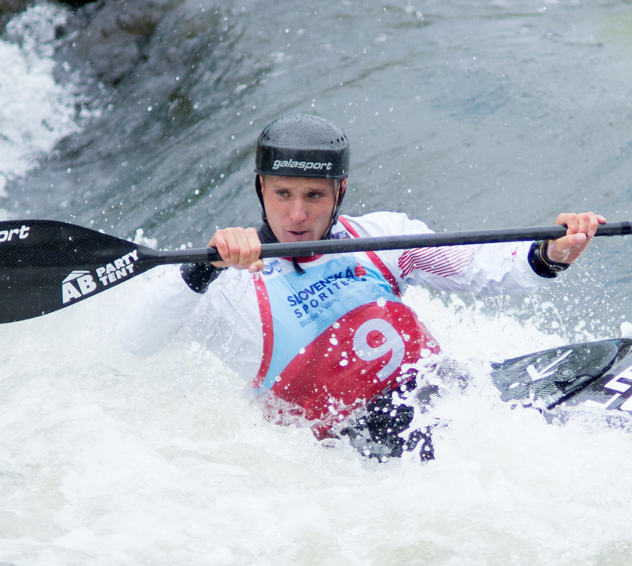 Vítek Přindiš